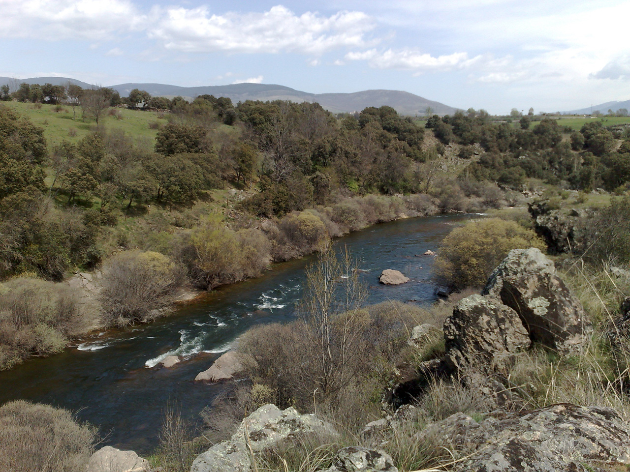 El río Lozoya, en su curso libre